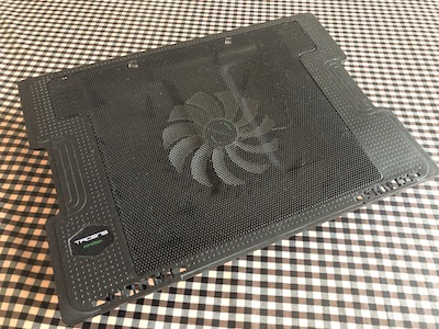 Una base refrigeradora es un accesorio muy útil para refrigerar tu ordenador portátil en épocas de verano o mientras juegas a videojuegos.